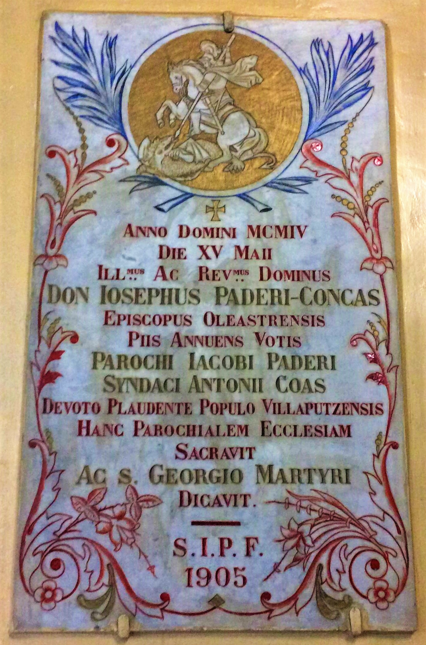 Anno Domini MCMIV Die XV Maii Ill[ustrissi]mus ac Rev[erendissi]mus Dominus Don Iosephus Paderi-Concas Episcopus Oleastrensis Piis Annuens Votis Parochi Iacobi Paderi Syndaci Antonii Coas Devoto Plaudente Populo Villaputzensis Hanc Parochialem Ecclesiam Sacravit Ac S[ancto] Georgio Martyri Dicavit - S.I.P.F. 1905